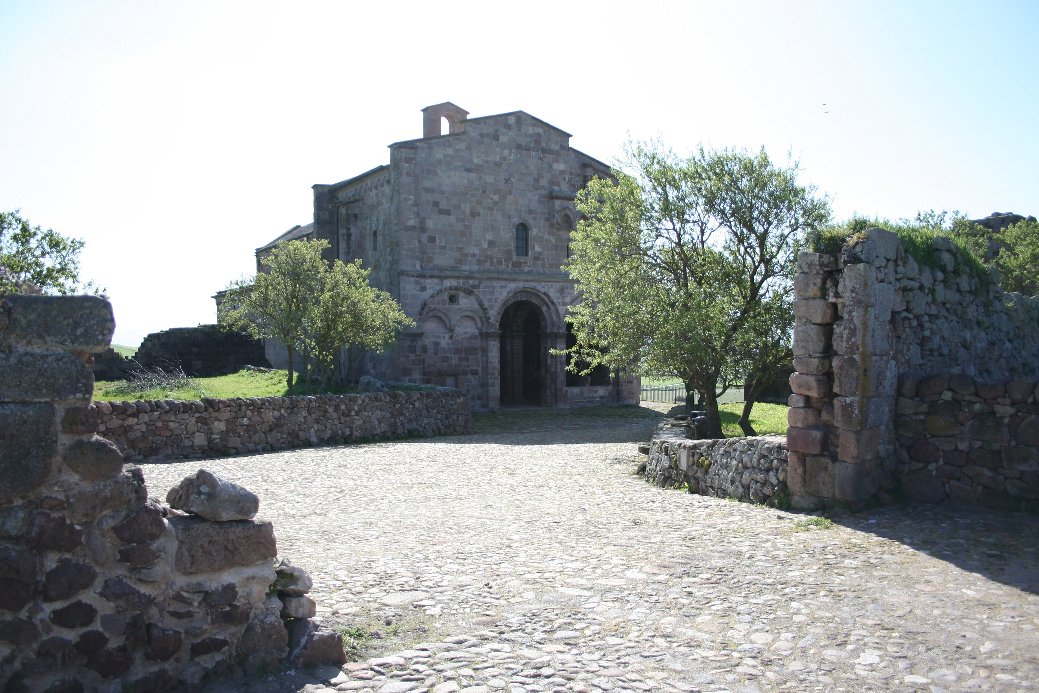 Cattedrale di Sant'Antioco di Bisarcio (Chilivani, Ozieri). Facciata